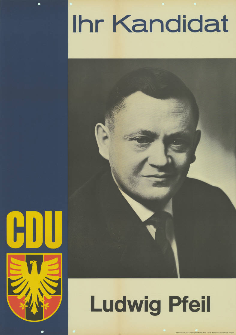 Ihr Kandidat CDU Ludwig Pfeil Abbildung: Porträtfoto Plakatart: Kandidaten-/Personenplakat mit Porträt Auftraggeber: Verantw.: CDU-Bundesgeschäftsstelle Bonn Drucker_Druckart_Druckort: Repro-Druck, Schmiden bei Stuttgart Objekt-Signatur: 10-010 : 223 Bestand: Landtagswahlplakate Rheinland-Pfalz (10-010) GliederungBestand10-18: Landtagswahlplakate Rheinland-Pfalz (10-010) » CDU Lizenz: KAS/ACDP 10-010 : 223 CC-BY-SA 3.0 DE